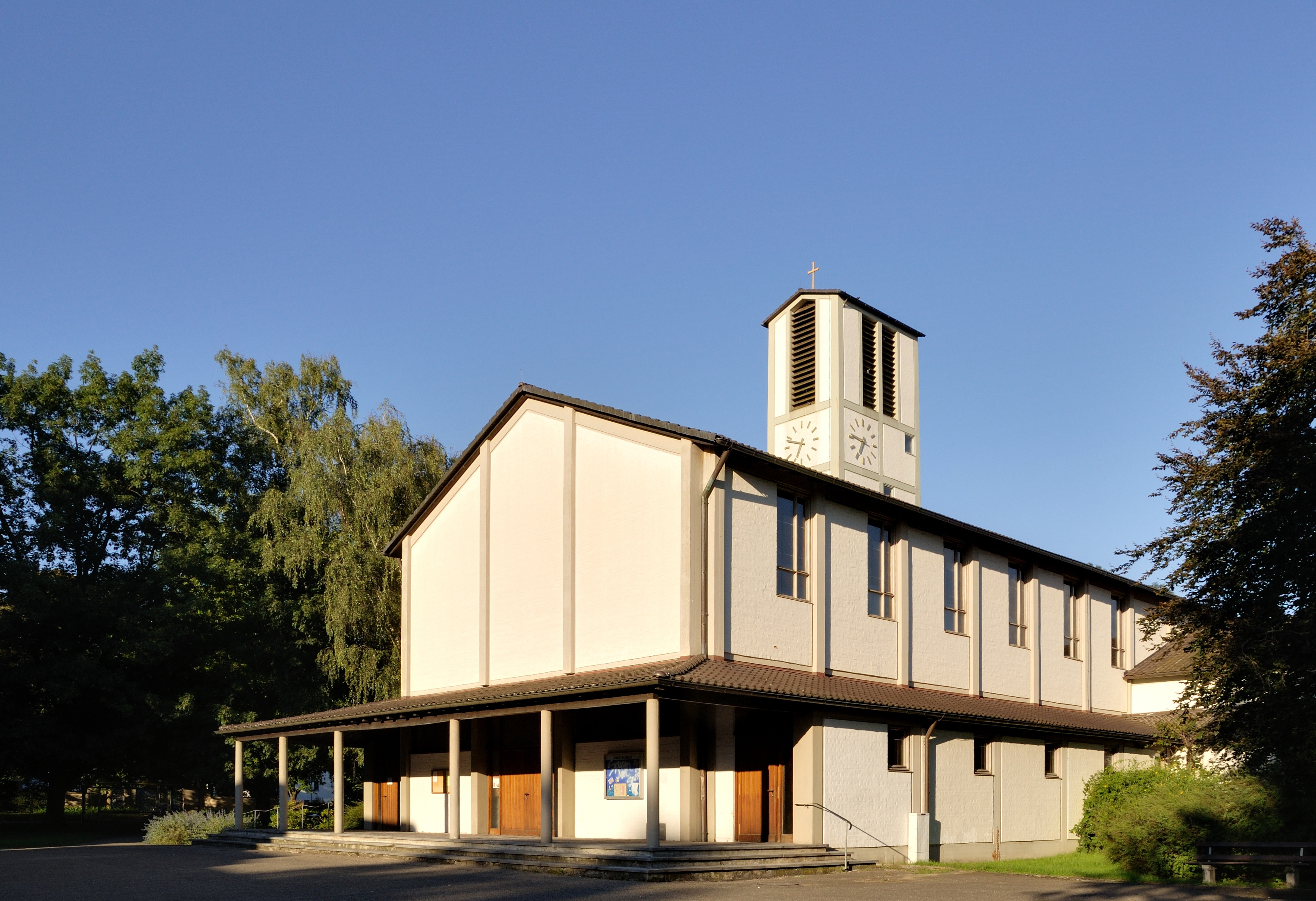 Christuskirche, Lörrach